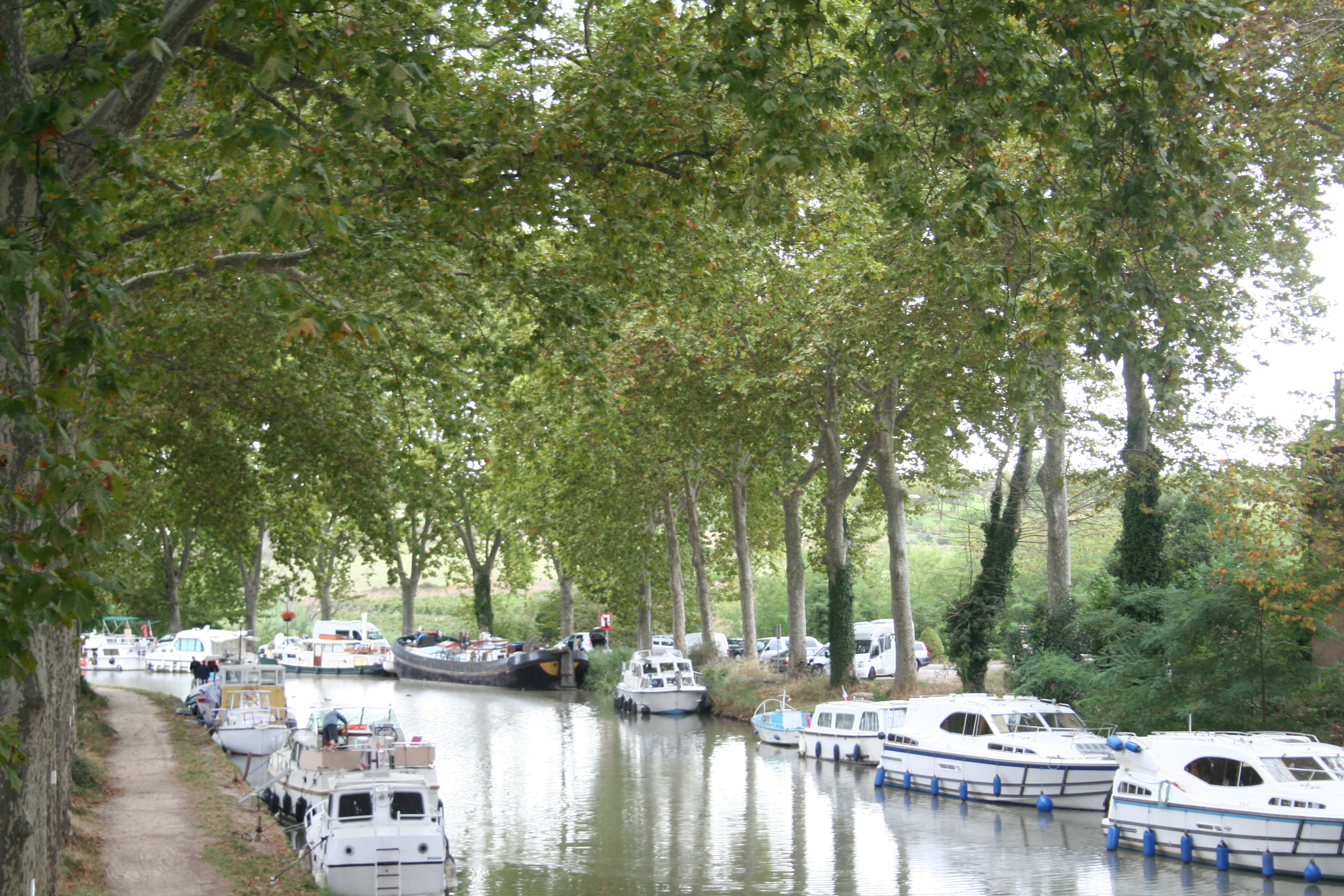 Capestang (Hérault) - Canal du Midi